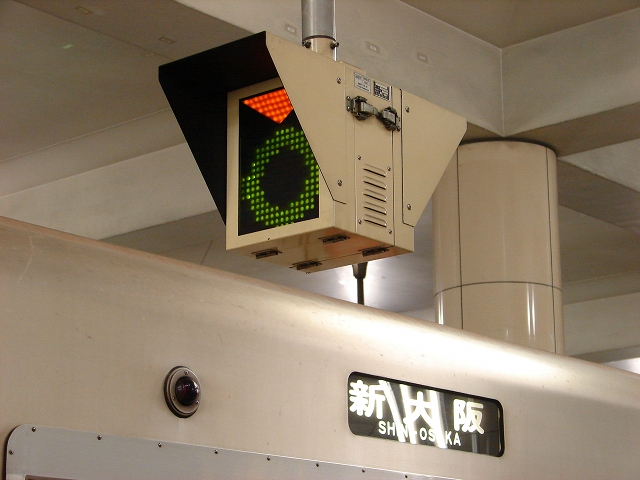 大阪市営地下鉄御堂筋線にある客扱い終了合図表示装置です